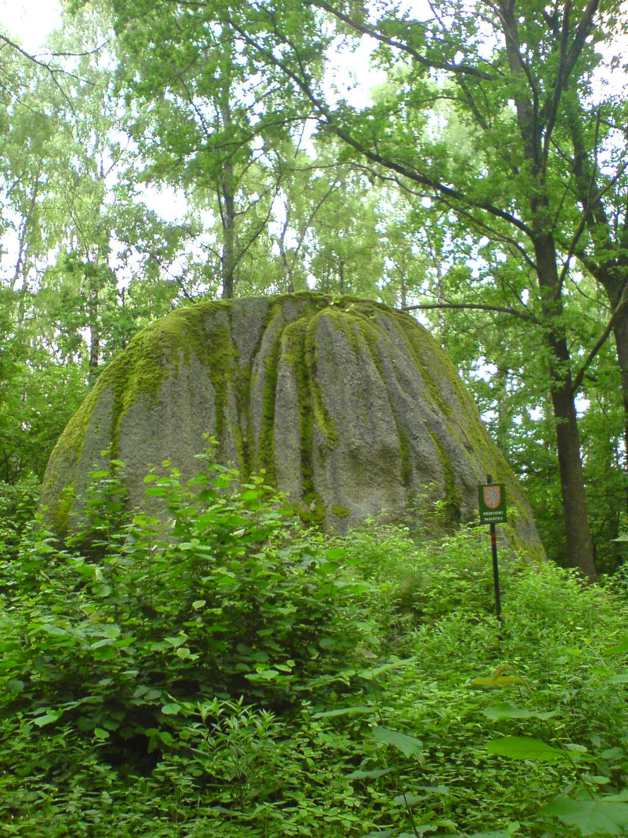 Přírodní památka Kynžvartský kámen v CHKO Slavkovský les, katastrální území Lázně Kynžvart, okres Cheb